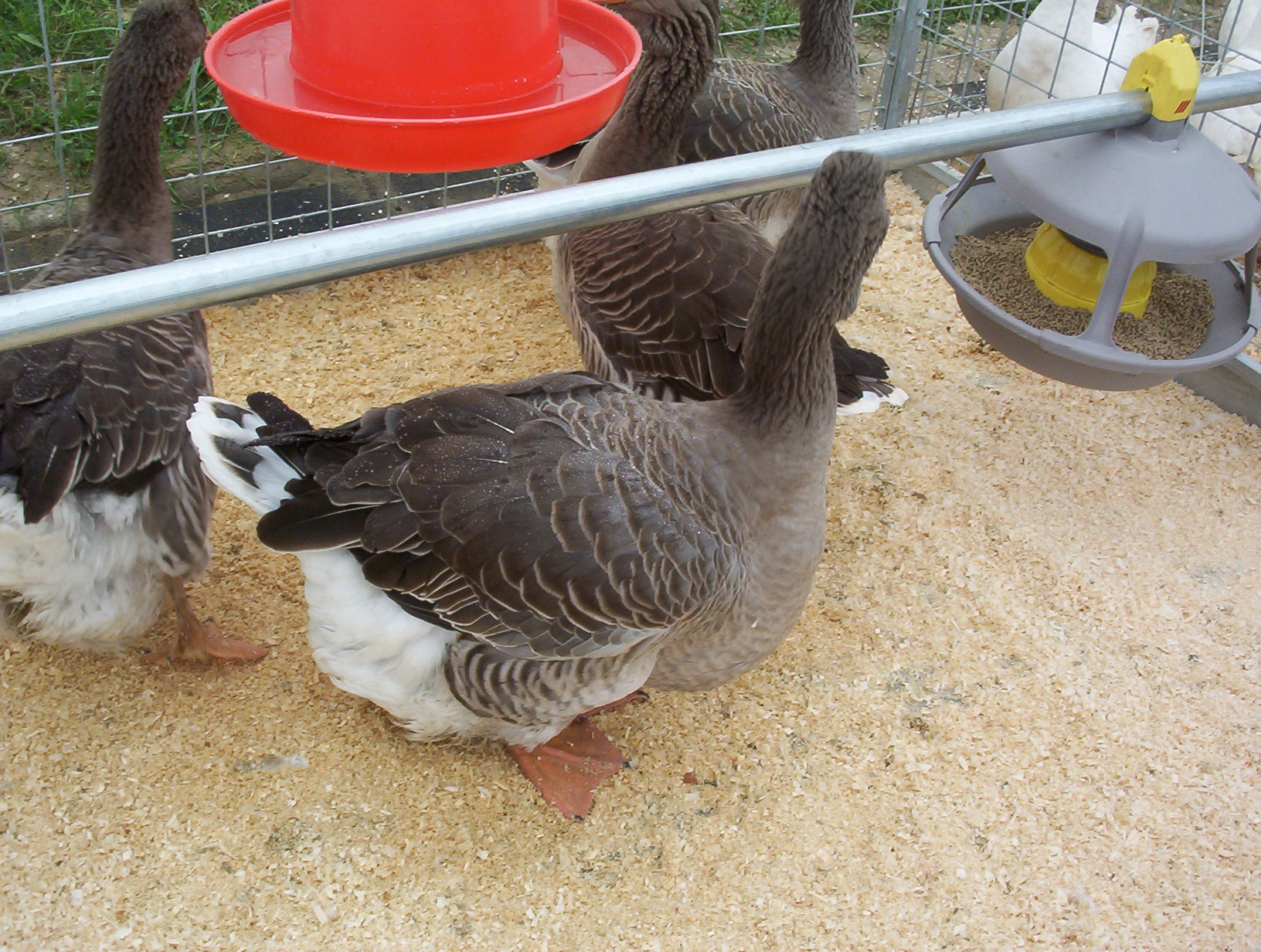 Toulouse-i ludak